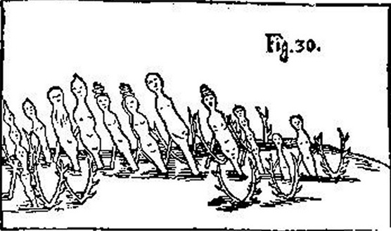 Idoles en bois fichée dans le sol enneigé de Laponie assimilées à des figurations d'Isis par Olaf Rudbeck en 1689